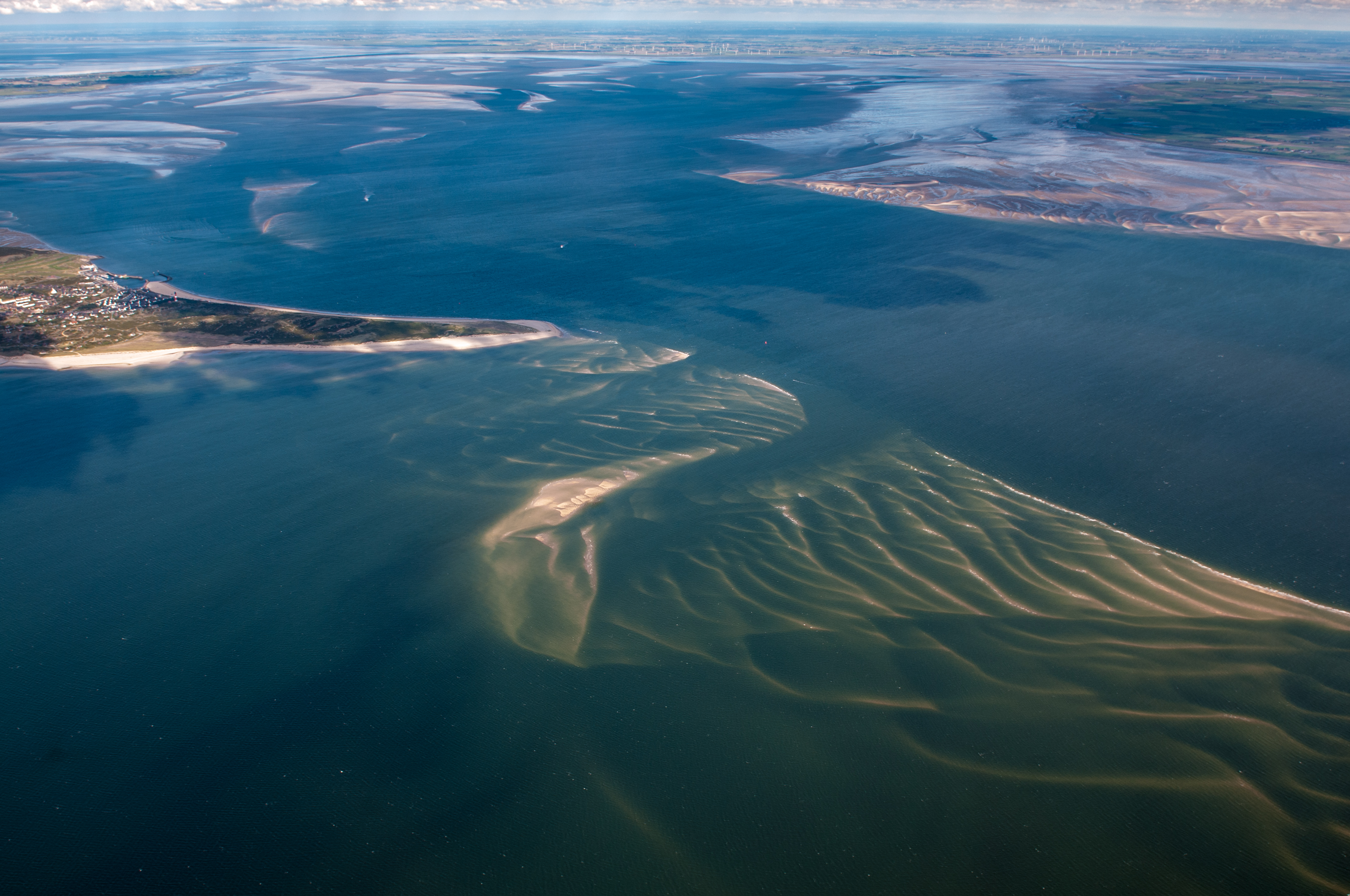 Kormoran-Insel